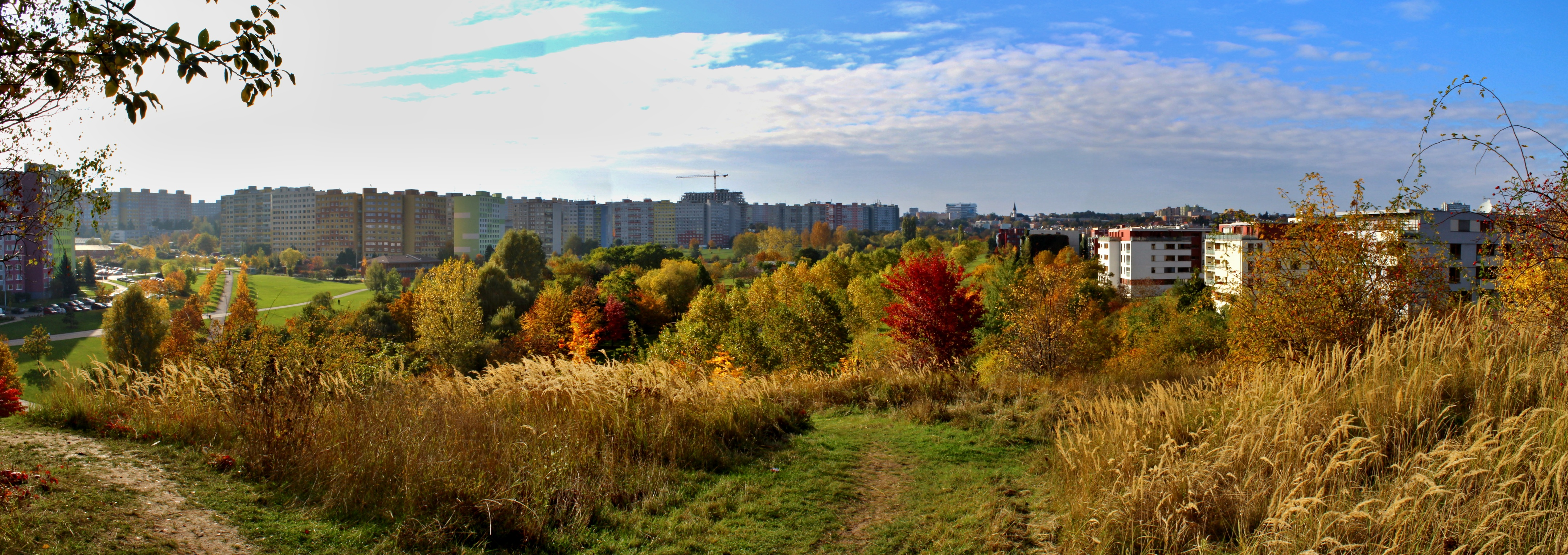 Centrální park Lužiny (Praha-Stodůlky)